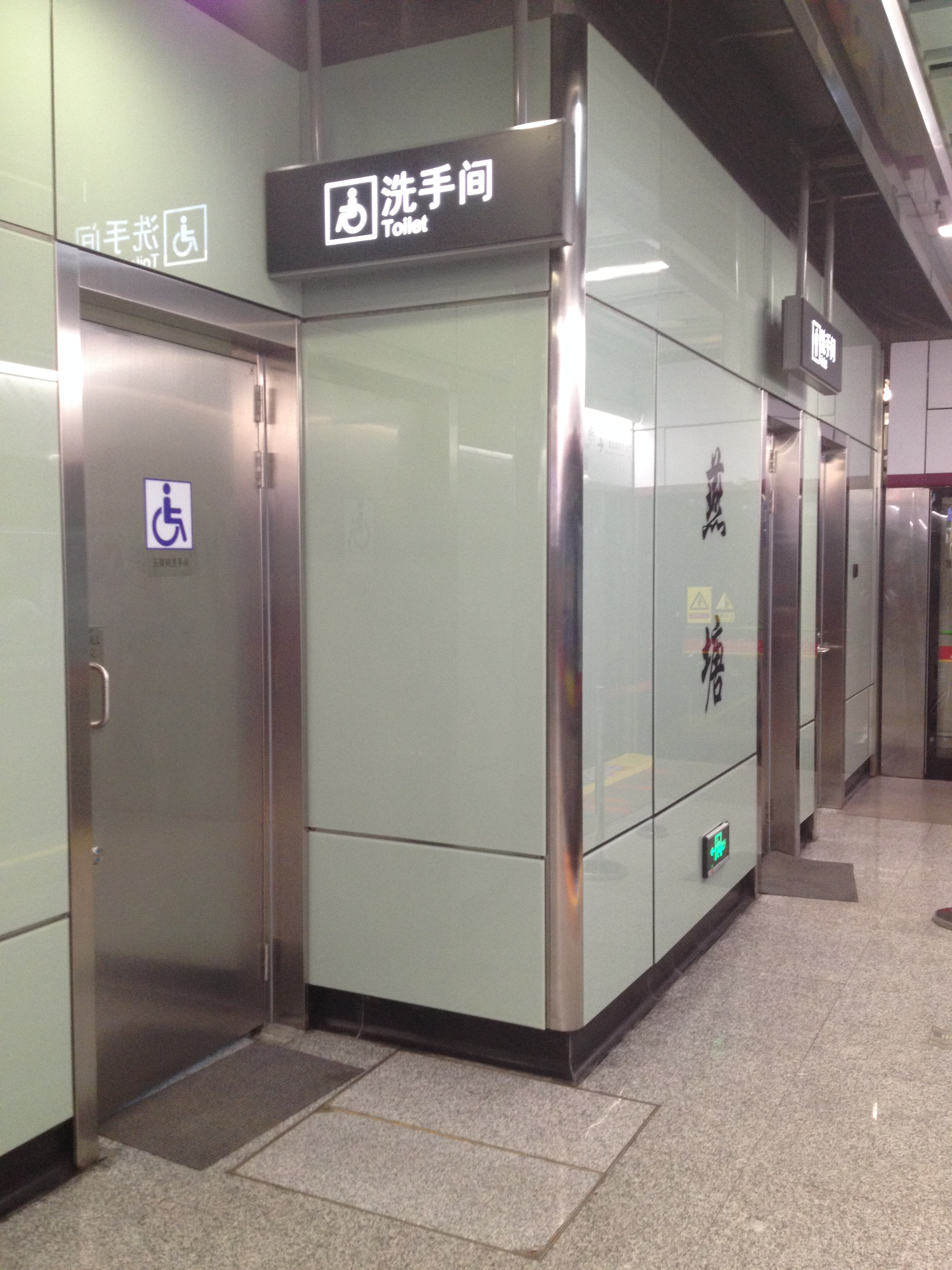 广州地铁6号线燕塘站月台洗手间